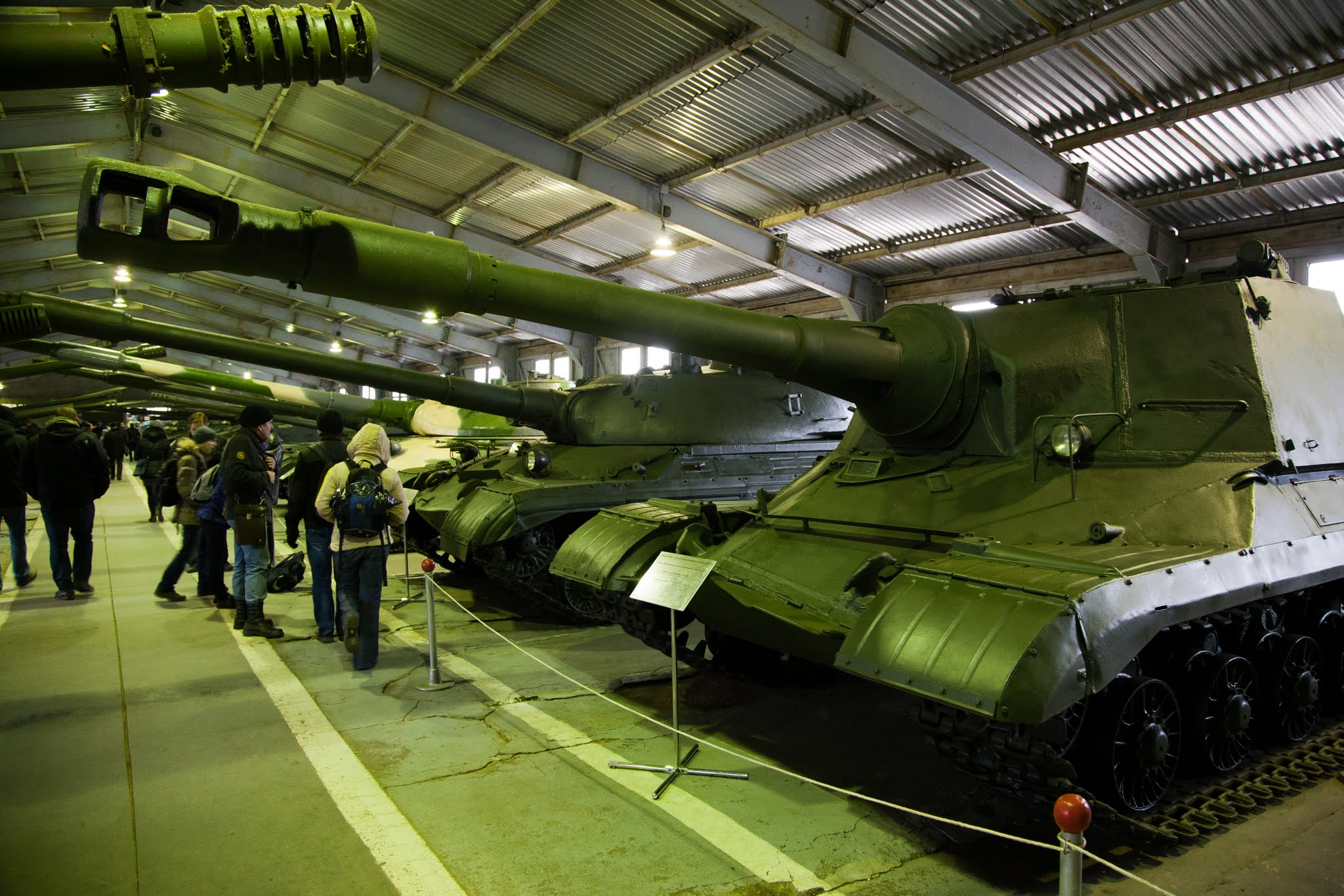 Опытная тяжёлая самоходная артиллерийская установка Объект 268 в Бронетанковом музее г. Кубинка.